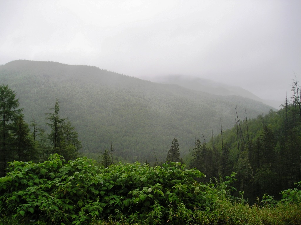 Горы Сихотэ-Алинь (Хабаровский край)